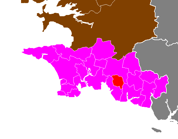 Maps of arrondissements and cantons of France: Arrondissement de Quimper - Canton de Bannalec.PNG (Département du Finistère , Arrondissement de Quimper)